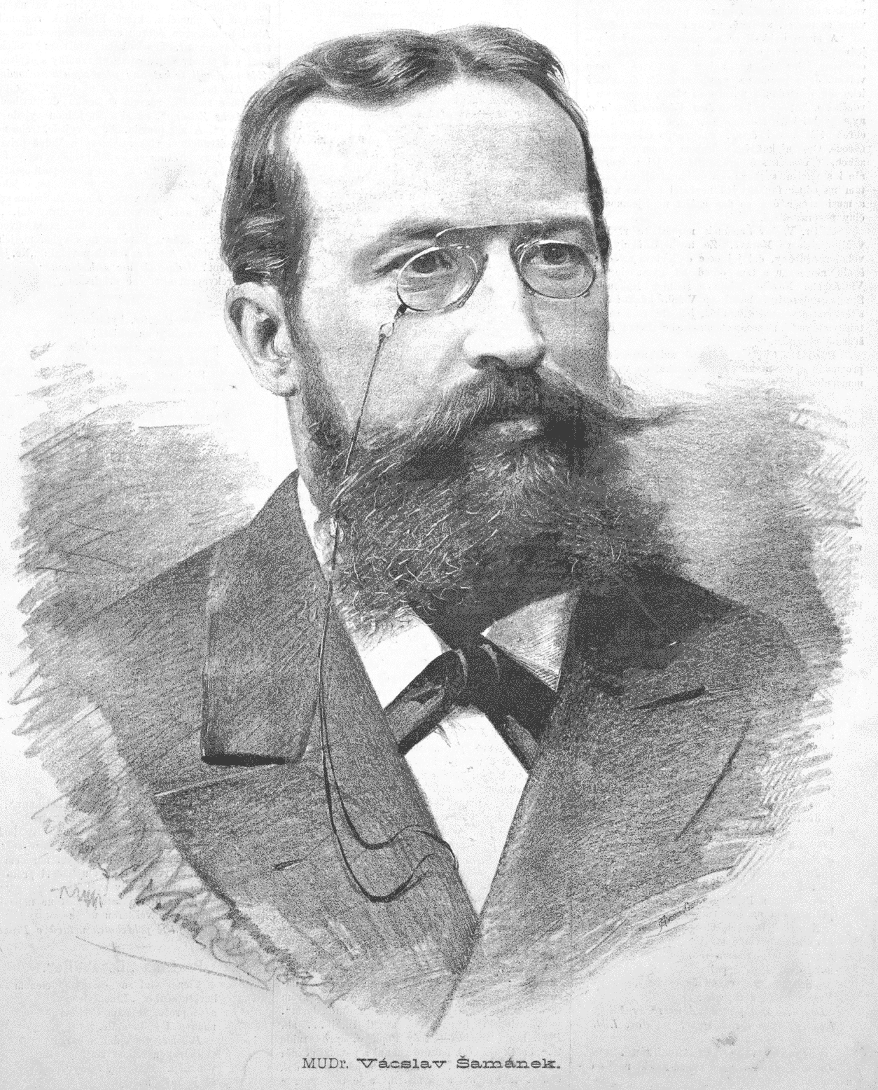 Portrait of Václav Šamánek (1846-1916)